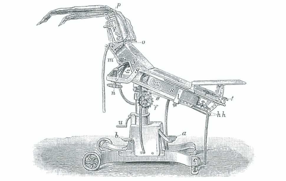 Operating table by Trendelenburg